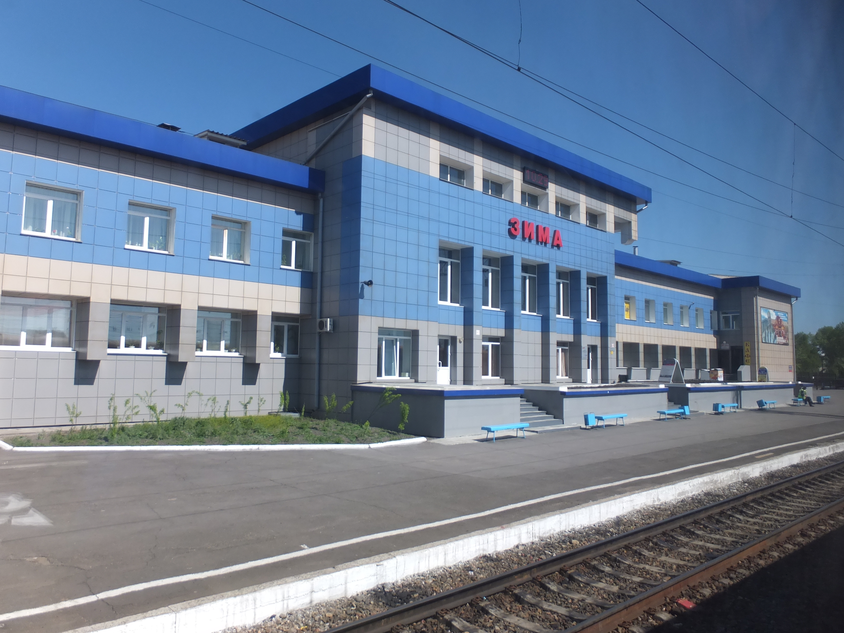 Bahnhof Sima (Streckenkilometer 4955 der Transsibirischen Eisenbahn)